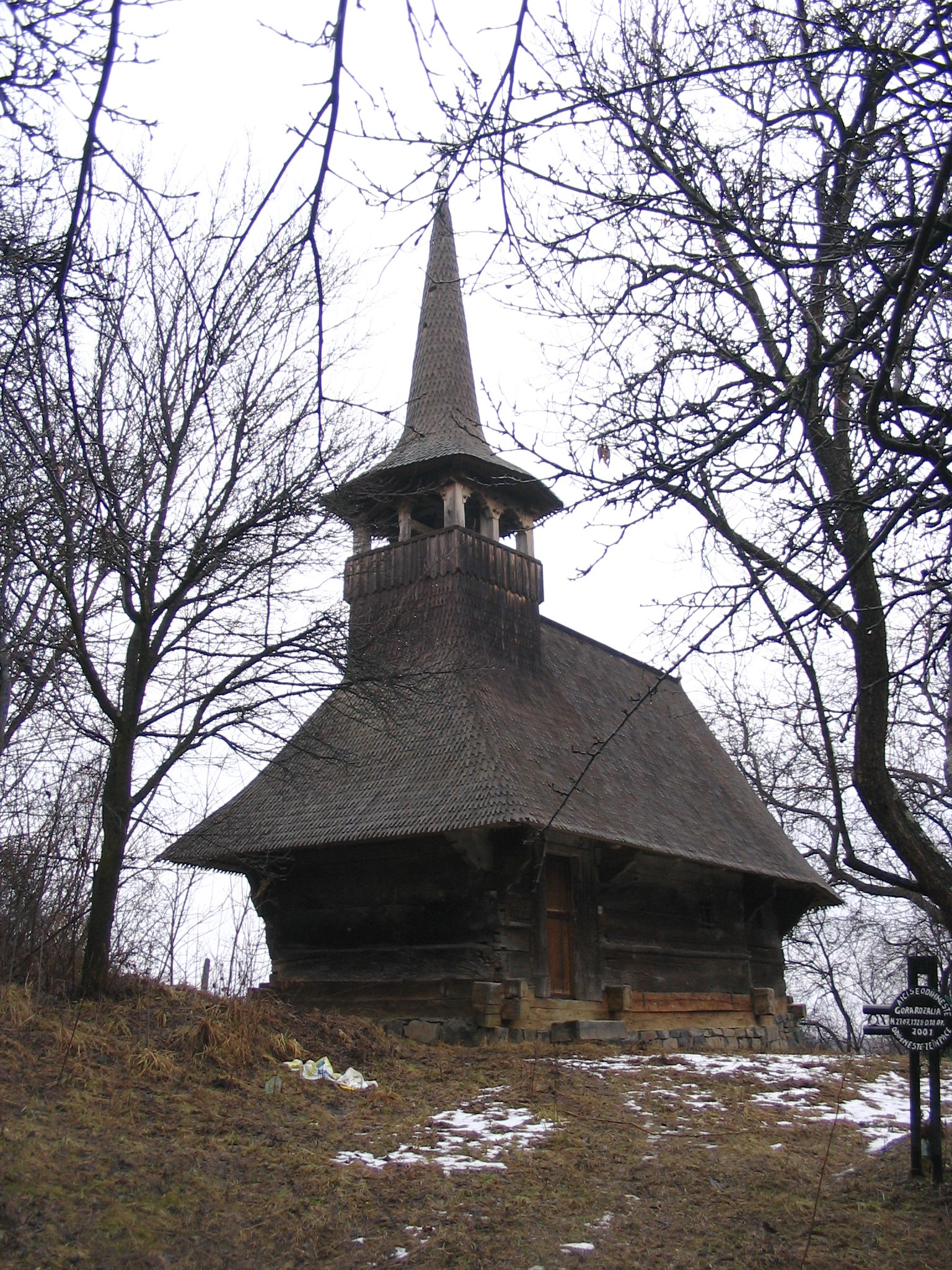 Biserica de lemn din Doba Mică